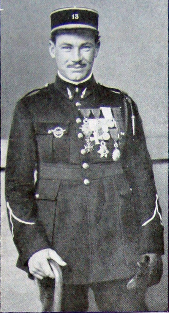 Michel Coiffard, as français de la Première Guerre mondiale.